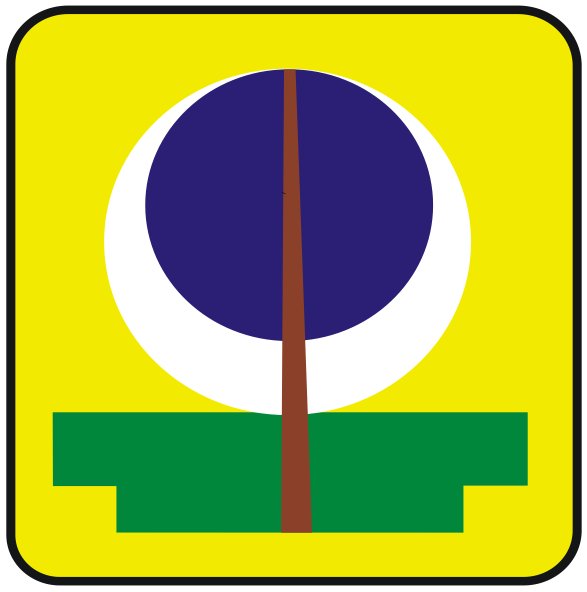 Escudo del Municipio de Lazaro Cardenas